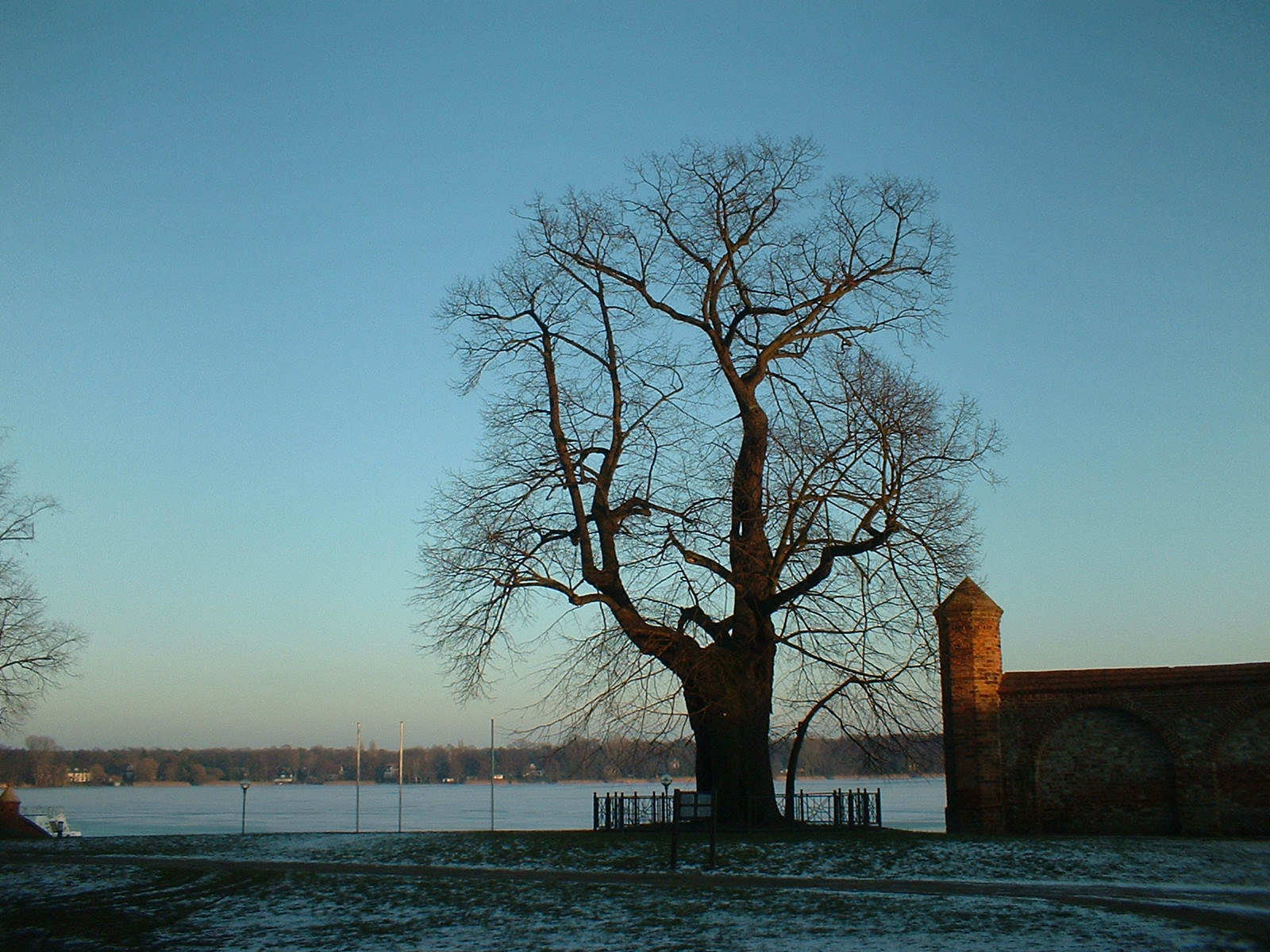 Wichmannlinde in Neuruppin, an der Stadtmauer bei der Neuruppiner Klosterkirche, eine nach Wichmann von Arnstein benannte Winterlinde (Tilia cordata)